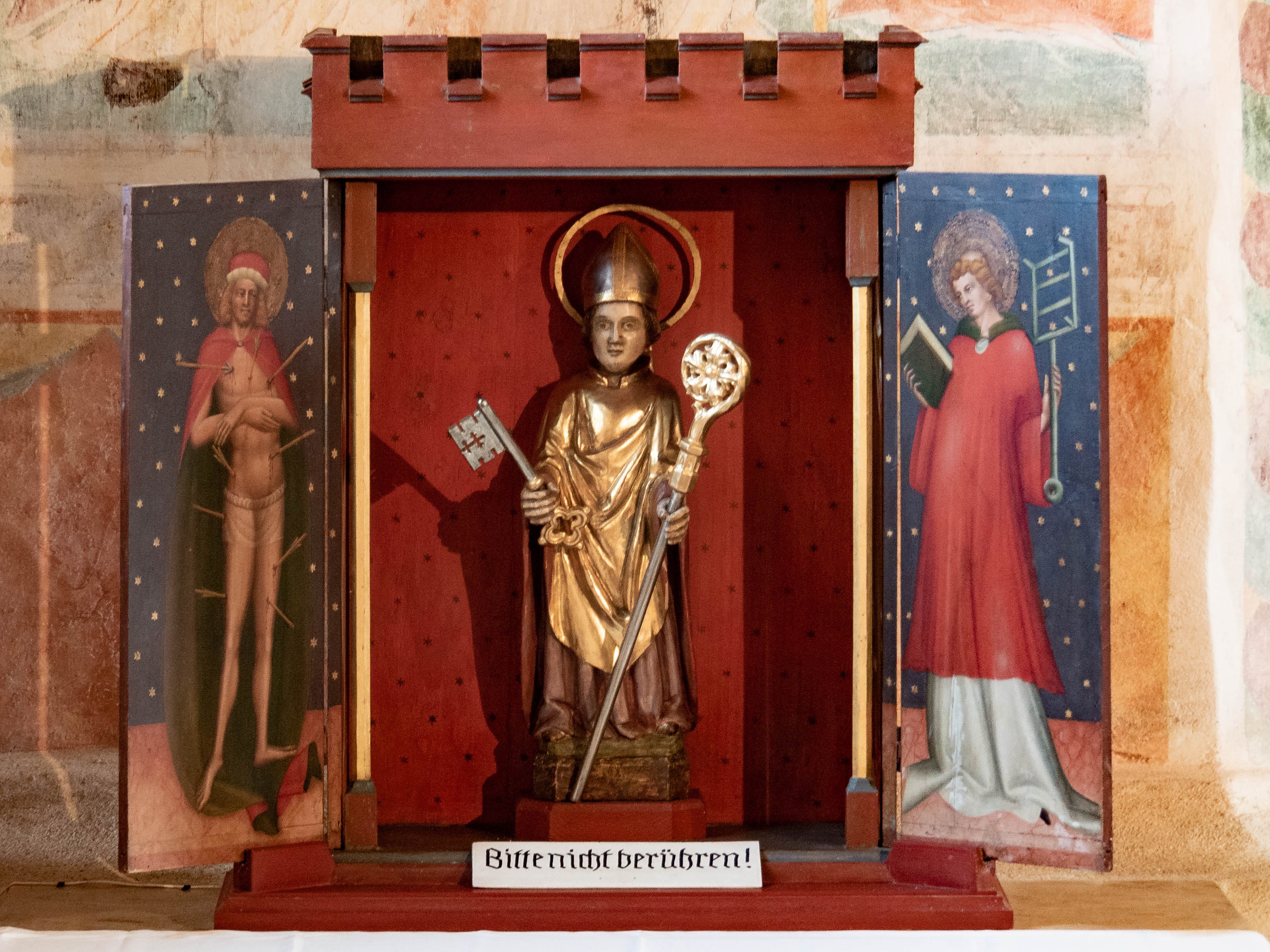 Kastenaltärchen in der Filialkirche Sankt Servatius auf dem Streichen